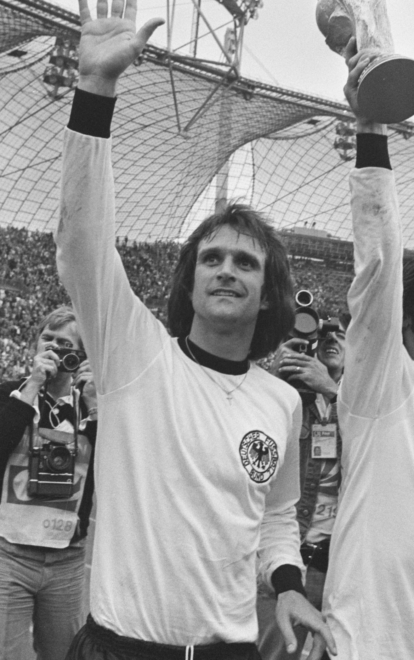 Collectie / Archief : Fotocollectie Anefo Reportage / Serie : [ onbekend ] Beschrijving : Finale wereldkampioenschap voetbal 1974 in Munchen, West Duitsland tegen Nederland 2-1; Gerd Muller met de wereldbeker, links Wolfgang Overath Datum : 7 juli 1974 Locatie : München, Nederland, West-Duitsland Trefwoorden : finales, sport, voetbal, wereldkampioenschappen Persoonsnaam : Gerd Muller Instellingsnaam : Nederland Fotograaf : Verhoeff, Bert / Anefo Auteursrechthebbende : Nationaal Archief Materiaalsoort : Negatief (zwart/wit) Nummer archiefinventaris : bekijk toegang 2.24.01.05 Bestanddeelnummer : 927-3080